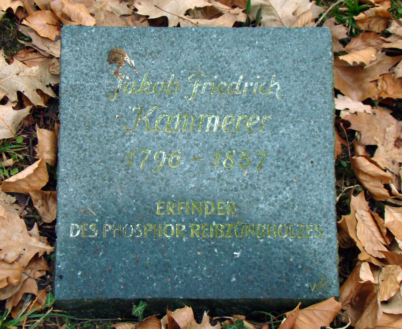 Alter Friedhof in Ludwigsburg, Gedenkstein Kammerer (Erfinder des Phosphorreibzündholzes)